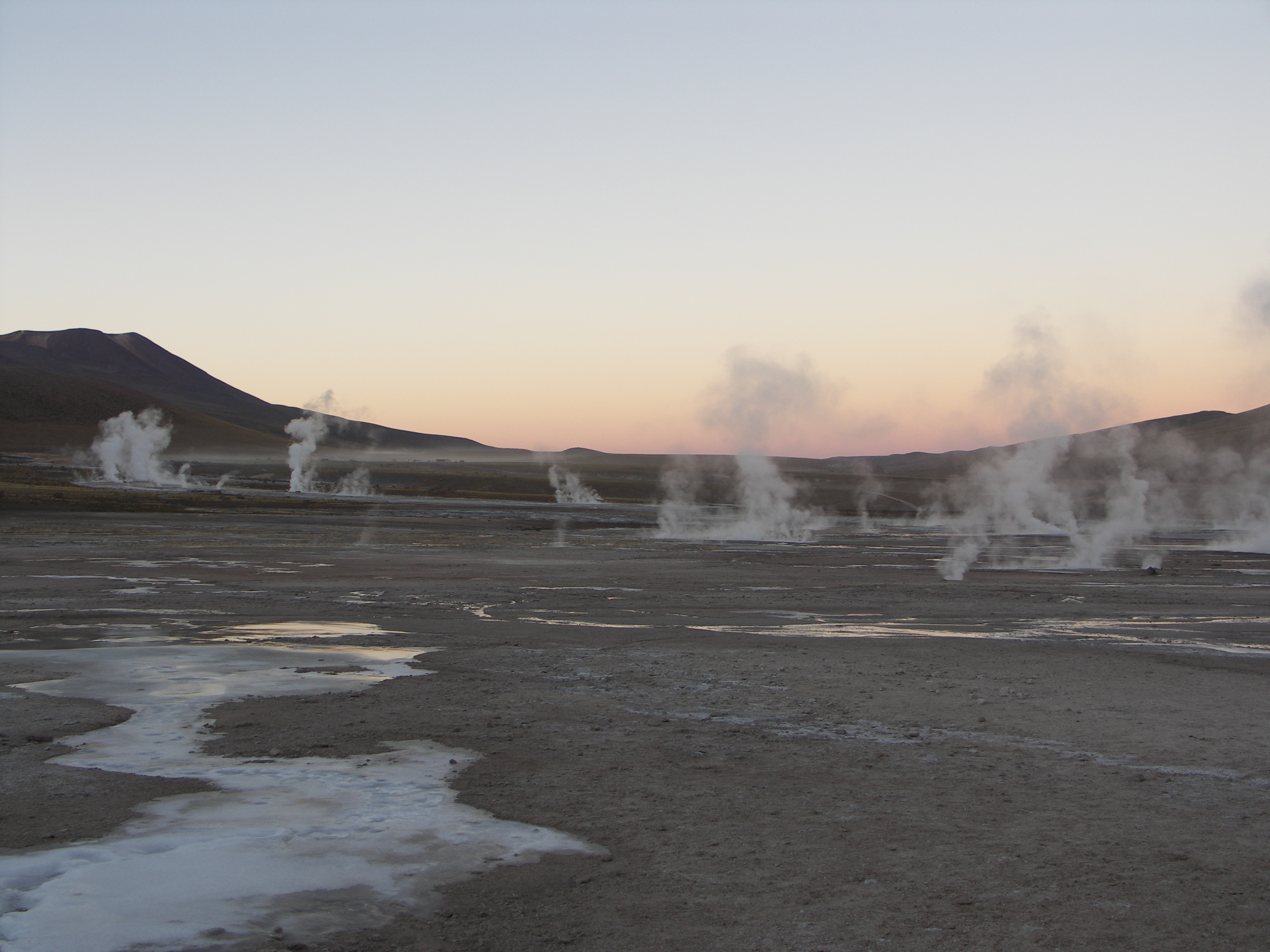 einige der Geysire am El Tatio